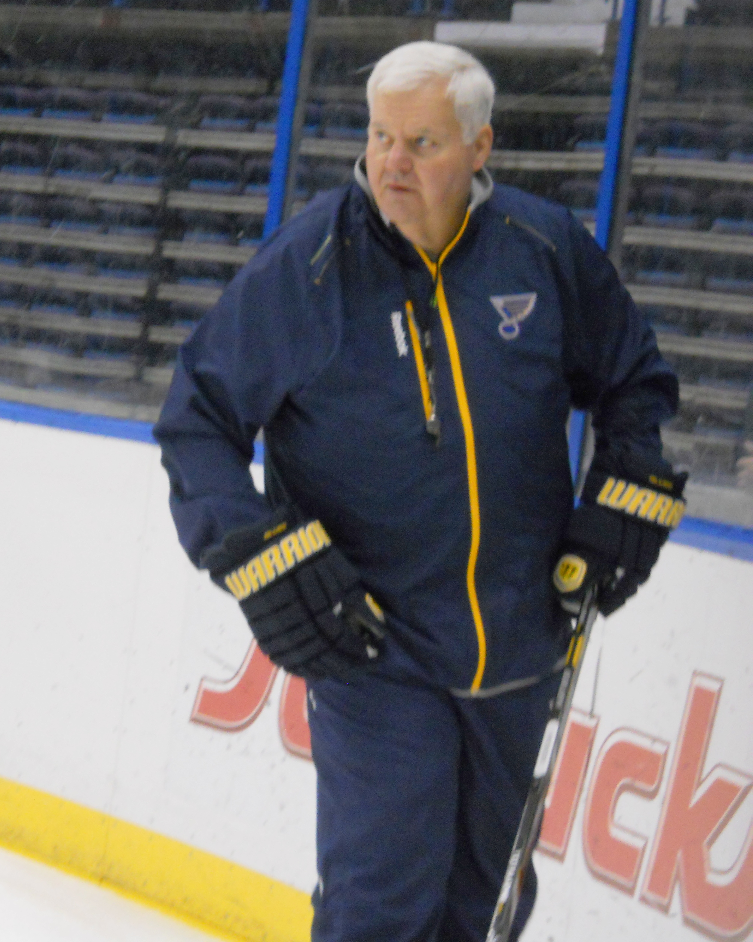 Ken Hitchcock in 2013